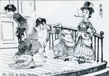 鹿鳴館での舞踏会のあいまの淑女のようすを風刺したビゴーのスケッチ